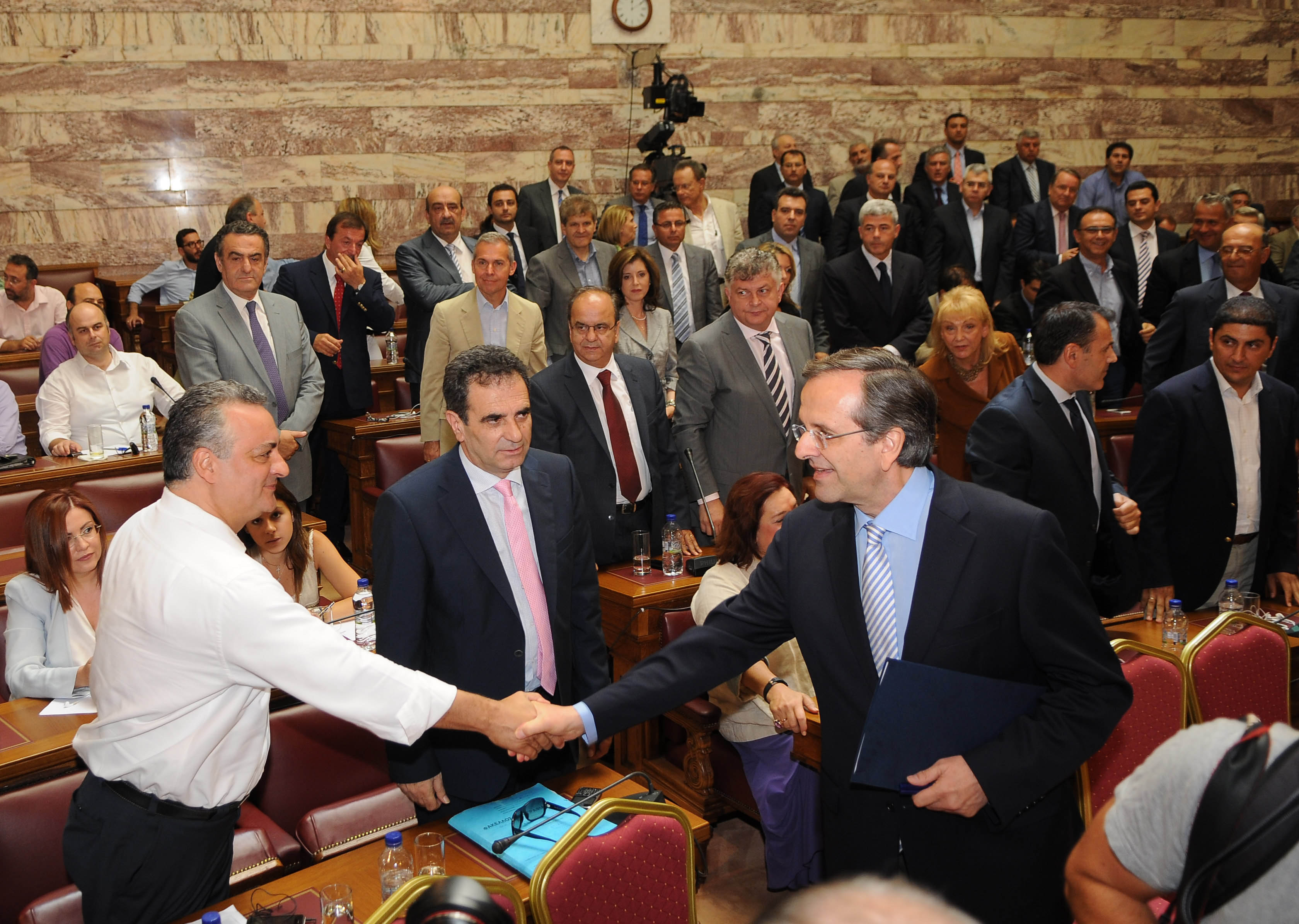 Αντώνης Σαμαράς - Συνεδρίαση Κοινοβουλευτικής Ομάδας 24/07/2012